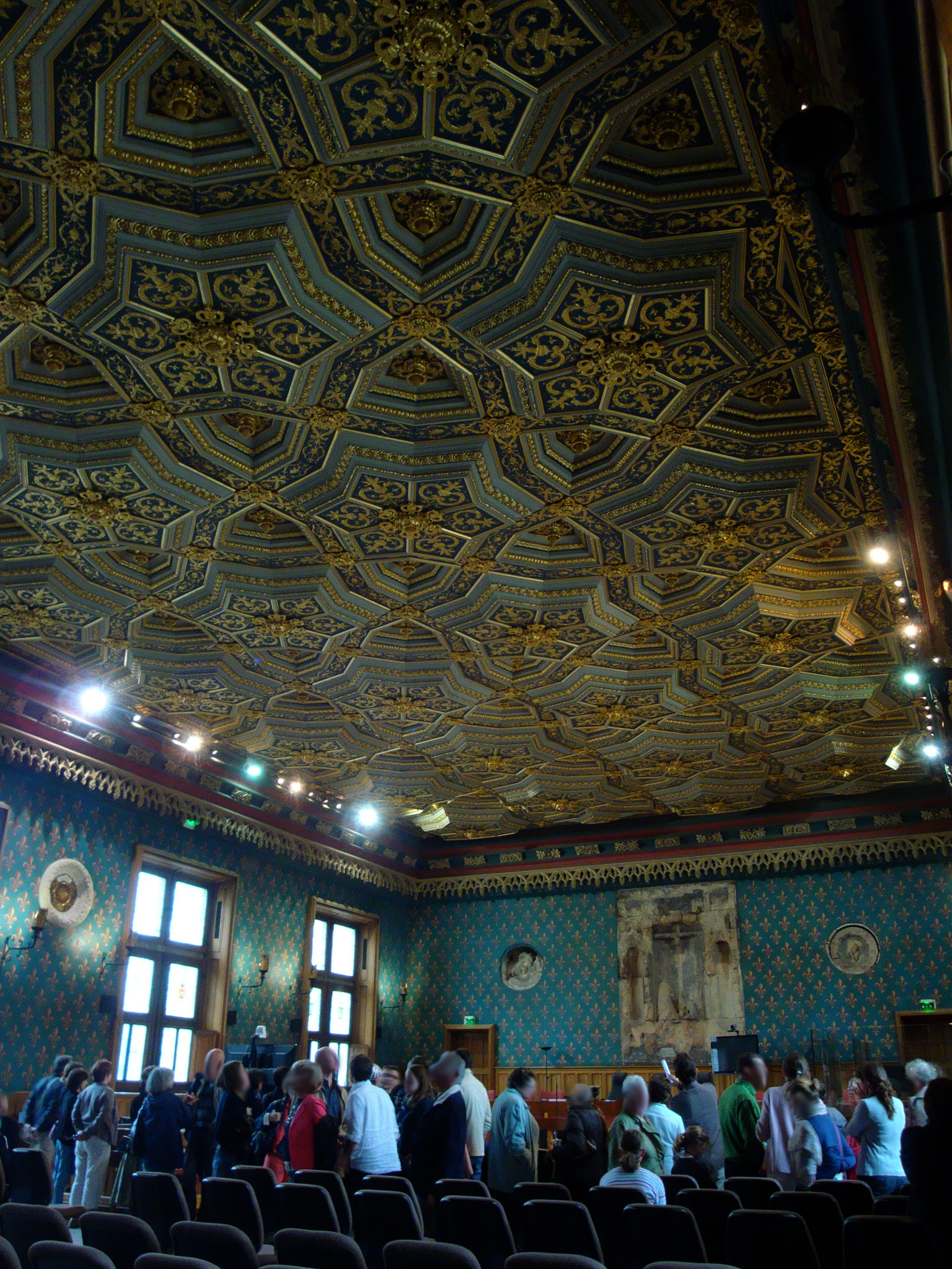 Photo prise pendant les journées du patrimoine 2013 à Rouen. Il s'agit de la salle de la cour d'Assises (qui ne se visite que pendant les journées du patrimoine)